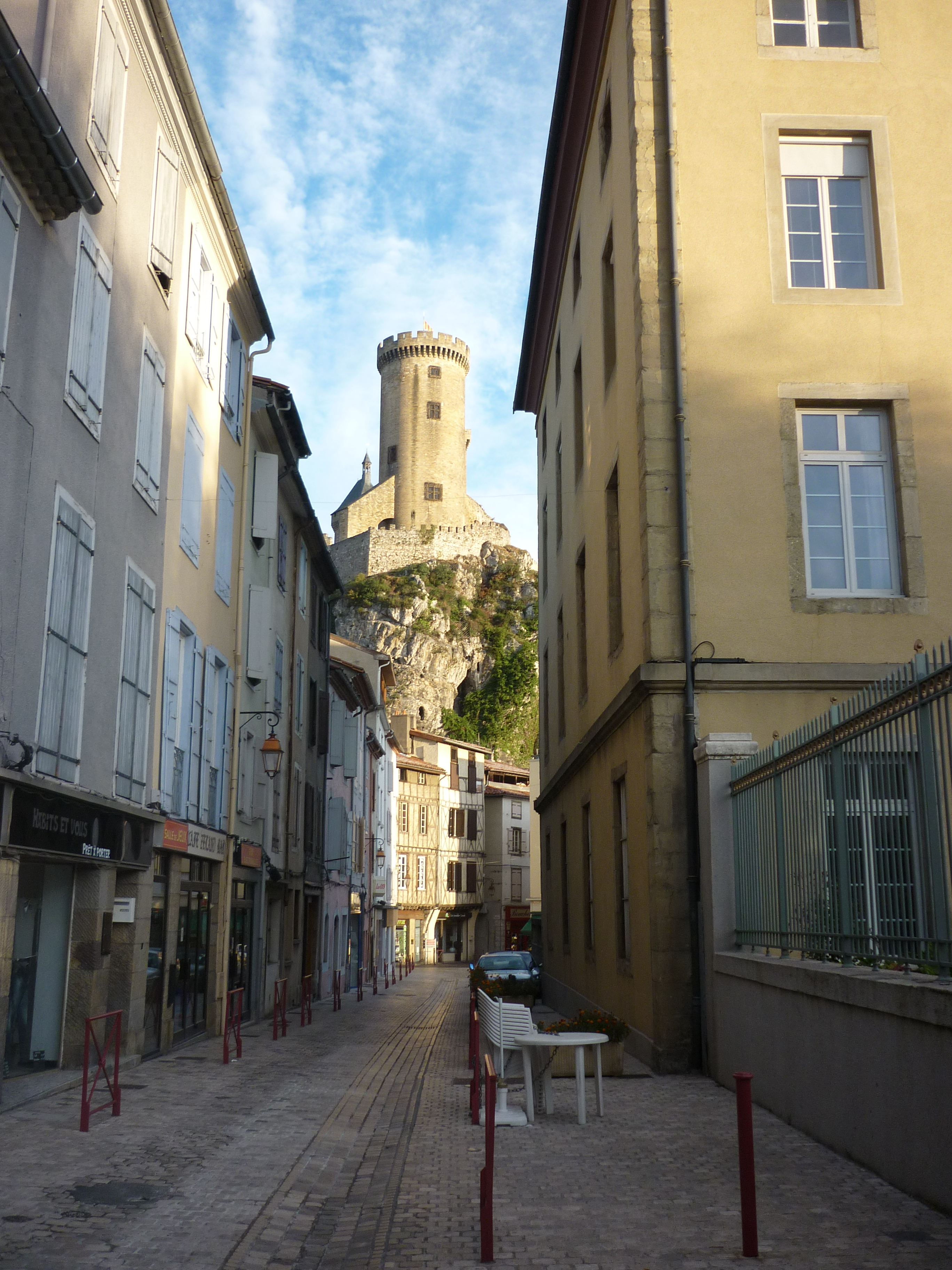 Foix (Ariège, Midi-Pyrénées, France), la rue Saint Jammes et le château comtal.